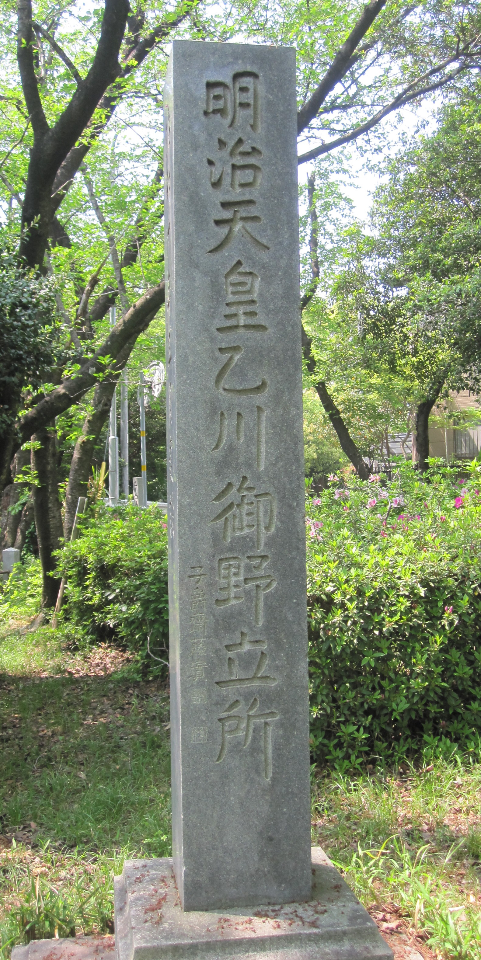 白山公園にて保存用資料として撮影